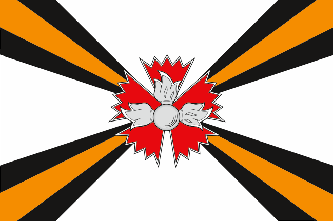 Флаг Главного разведывательного управления Генерального Штаба Вооружённых Сил Российской Федерации